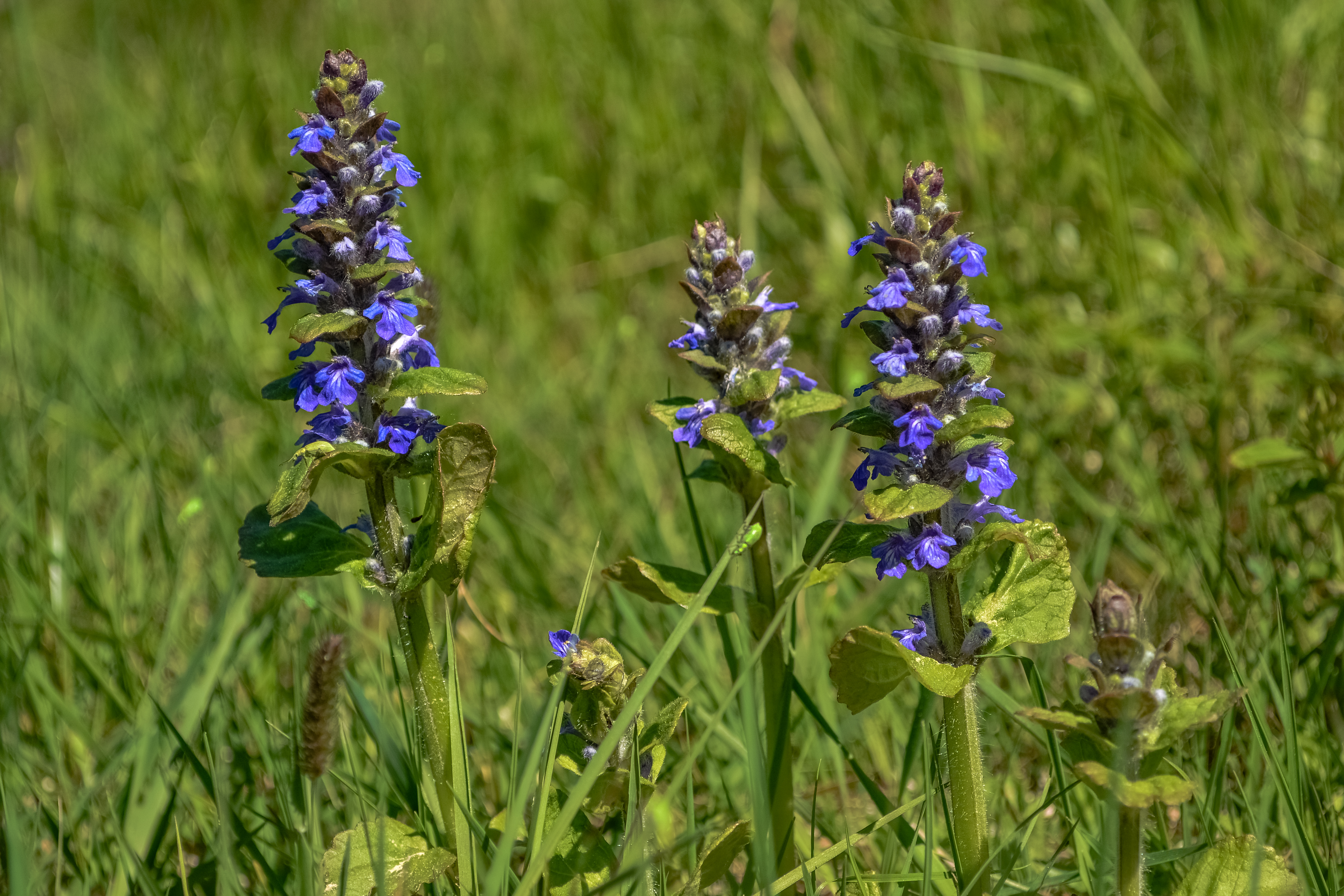 Zbehovec plazivý je rastlina z čeľade hluchavkovité.